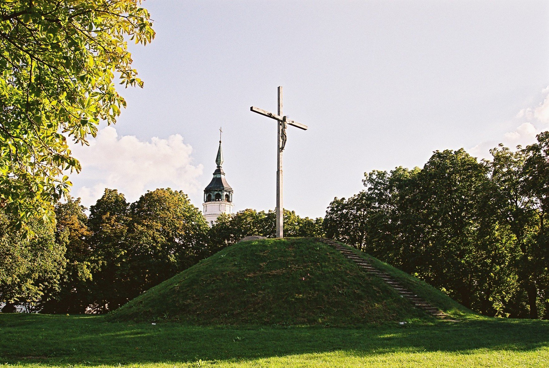 Wysoka Górka